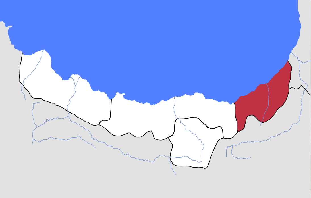 ლაზისტანის სანჯაყი